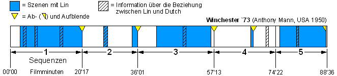 Zeitleiste des Filmes "Winchester 73" von Anthony Mann aus dem Jahre 1950. Untersuchungsrelevante Inhalte sind eingezeichnet.